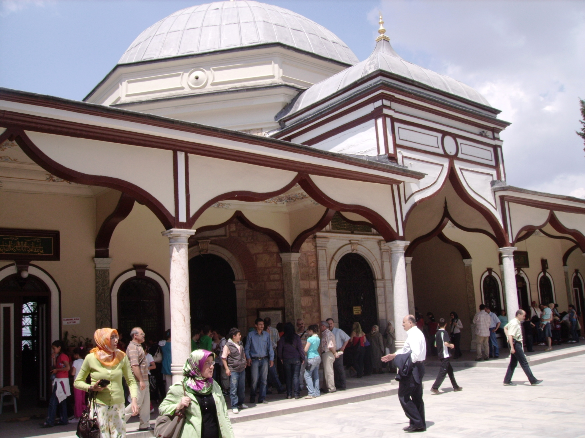 bursa -emirsultan